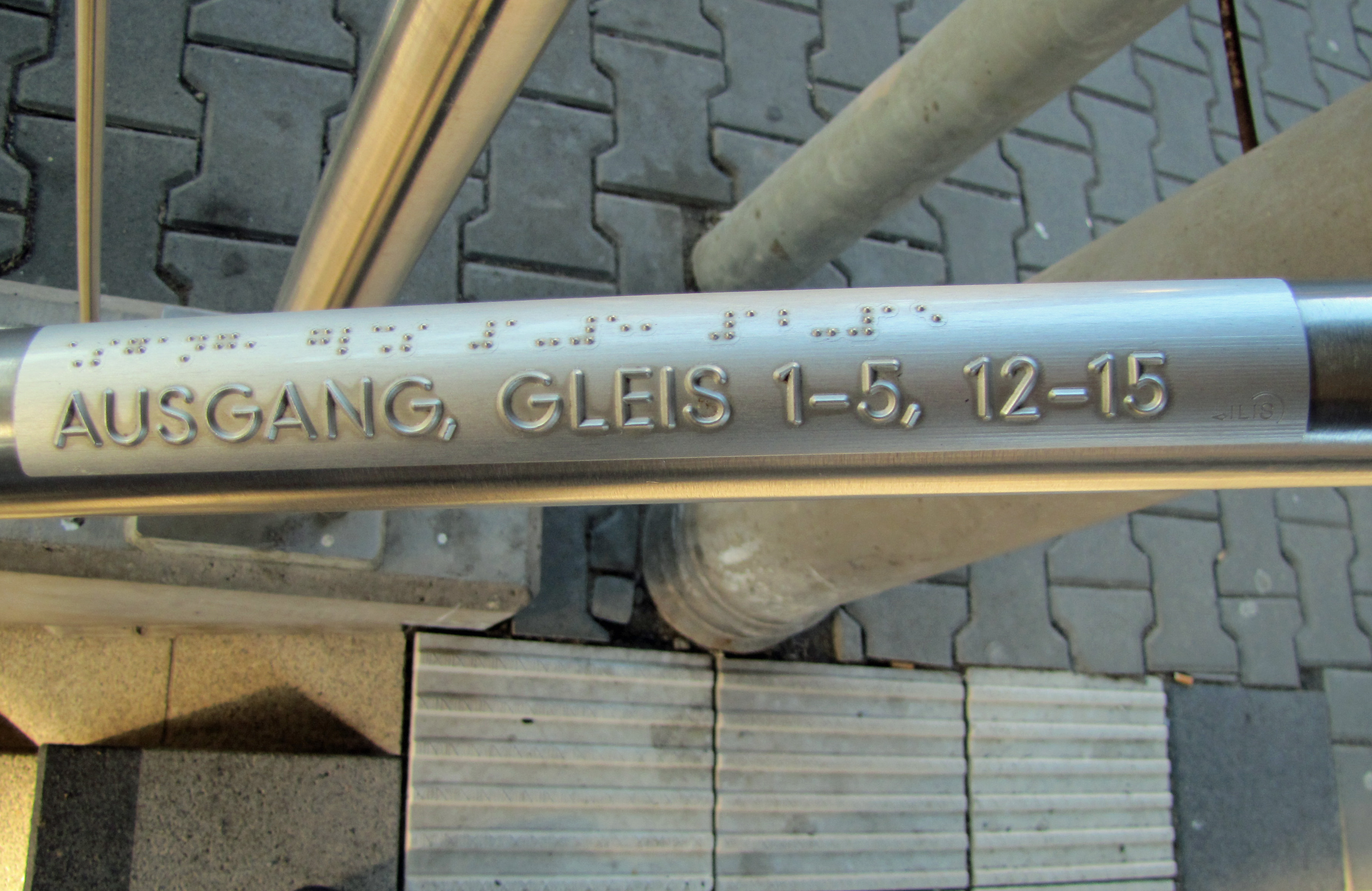 Erhabene Schriftenplatte für Blinde und Sehende, 2015 am Anfang des Treppenabgangs zur Unterführung des Bahnhofes in Giessen.